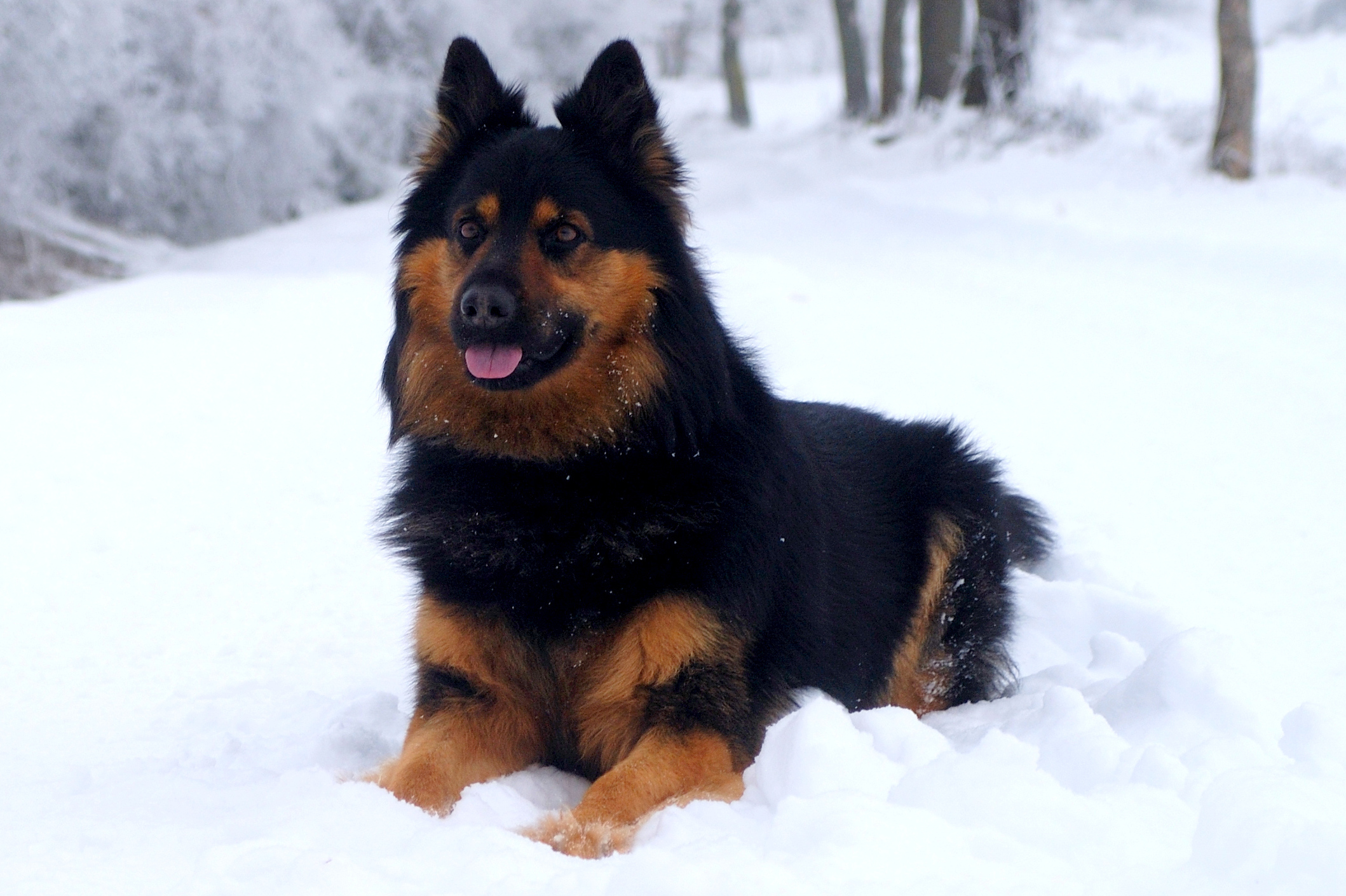 chodský pes